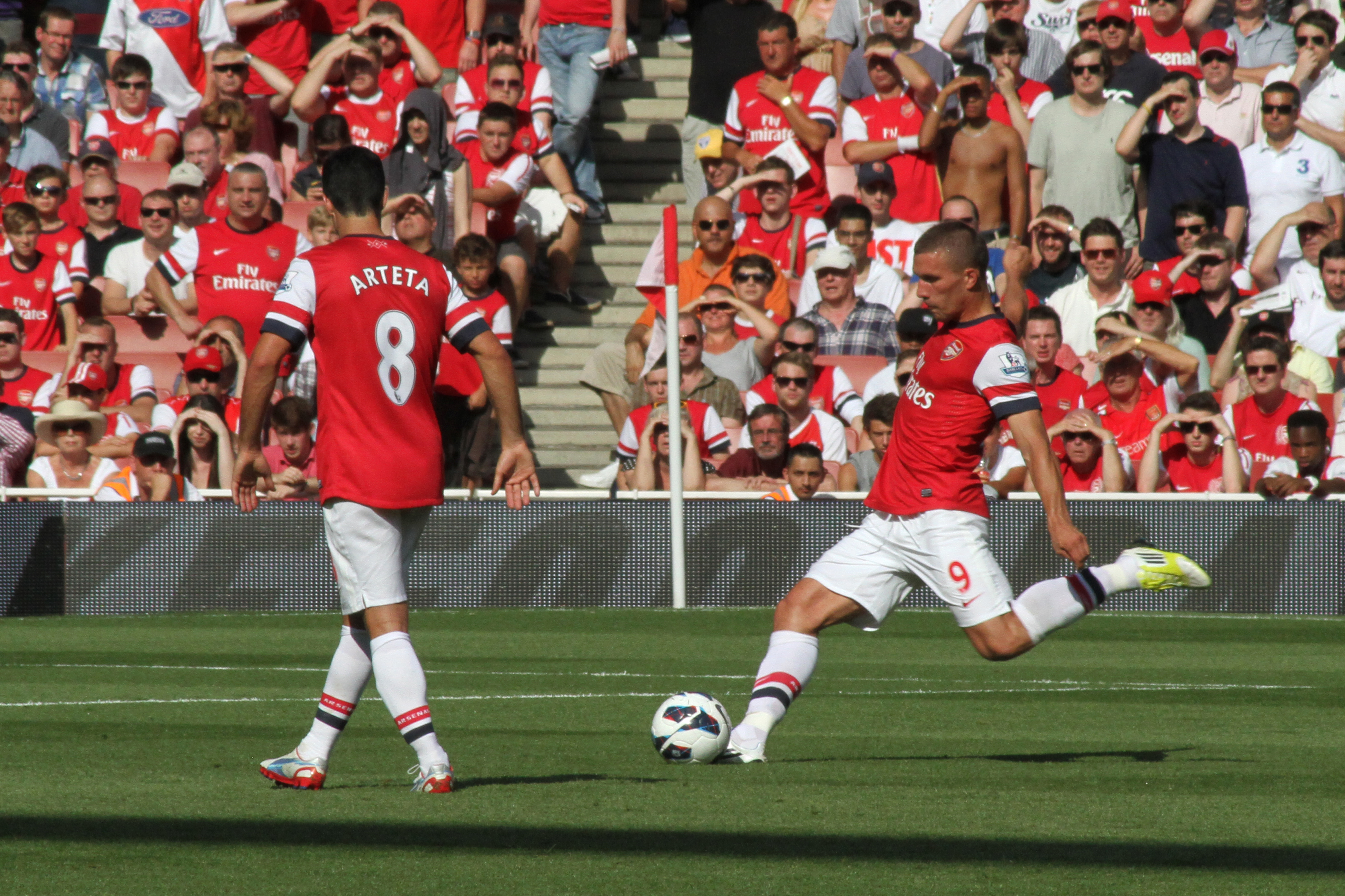 Mikel Arteta & Lukas Podolski